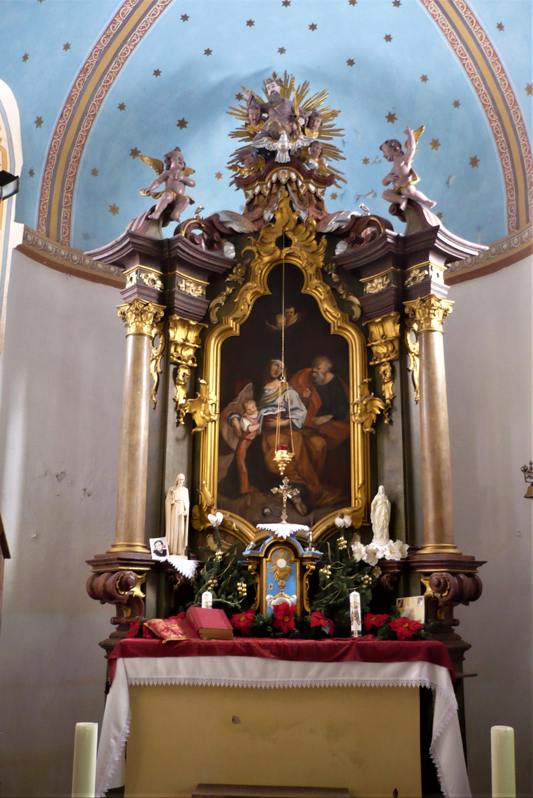 Ołtarz